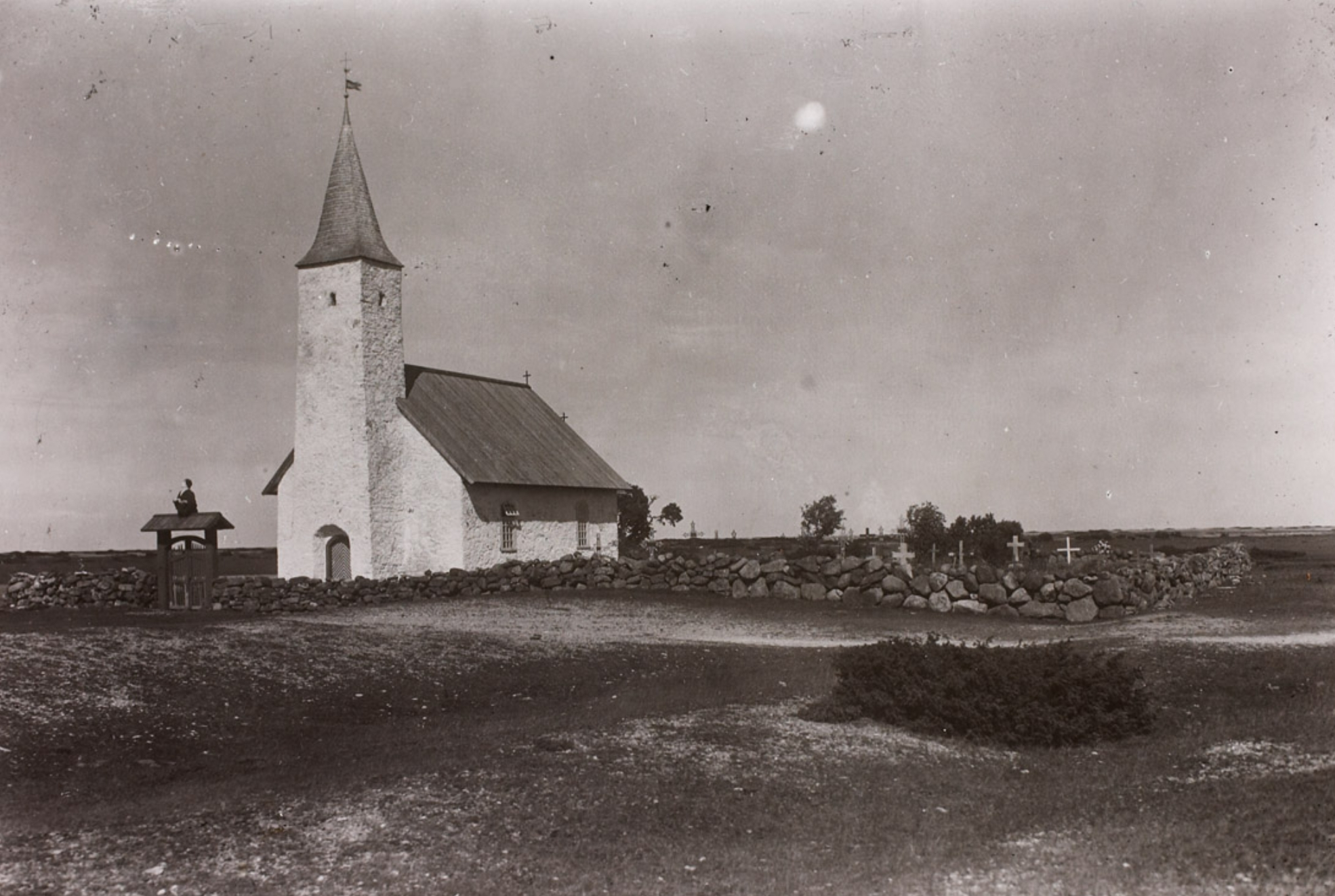 Osmussaare kabel 20. sajandi esimesel veerandil